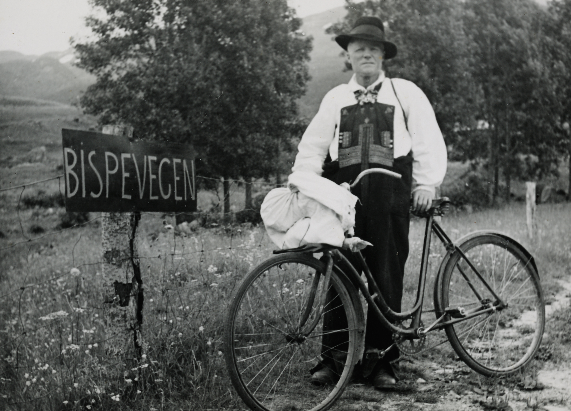 Meyer, Elisabeth Man with bicycle. Left - a sign for "Bispevegen" Photographs from Setesdal around 1940-42. Gelatin silver print, baryta NMFF.002574-24